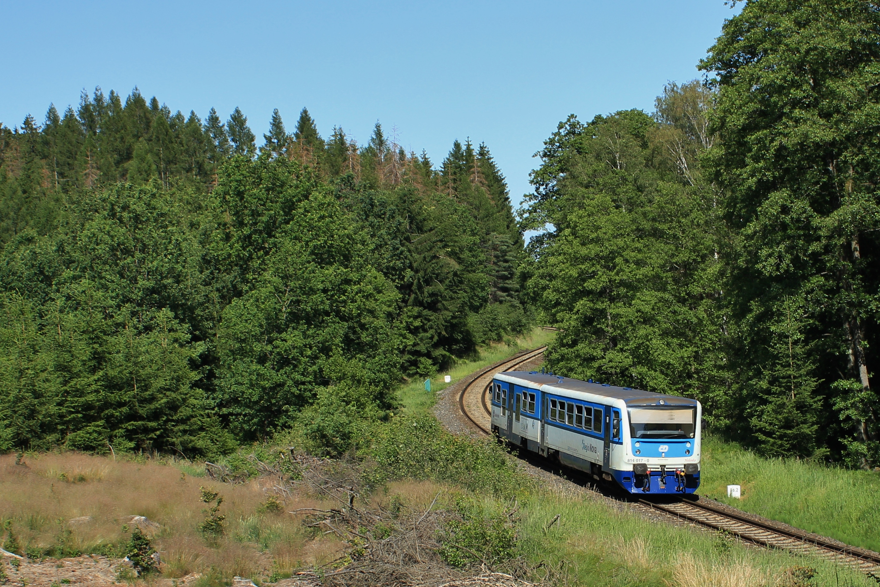 osbní vlak linky U8 DÚK, jednotka 814.016, 814